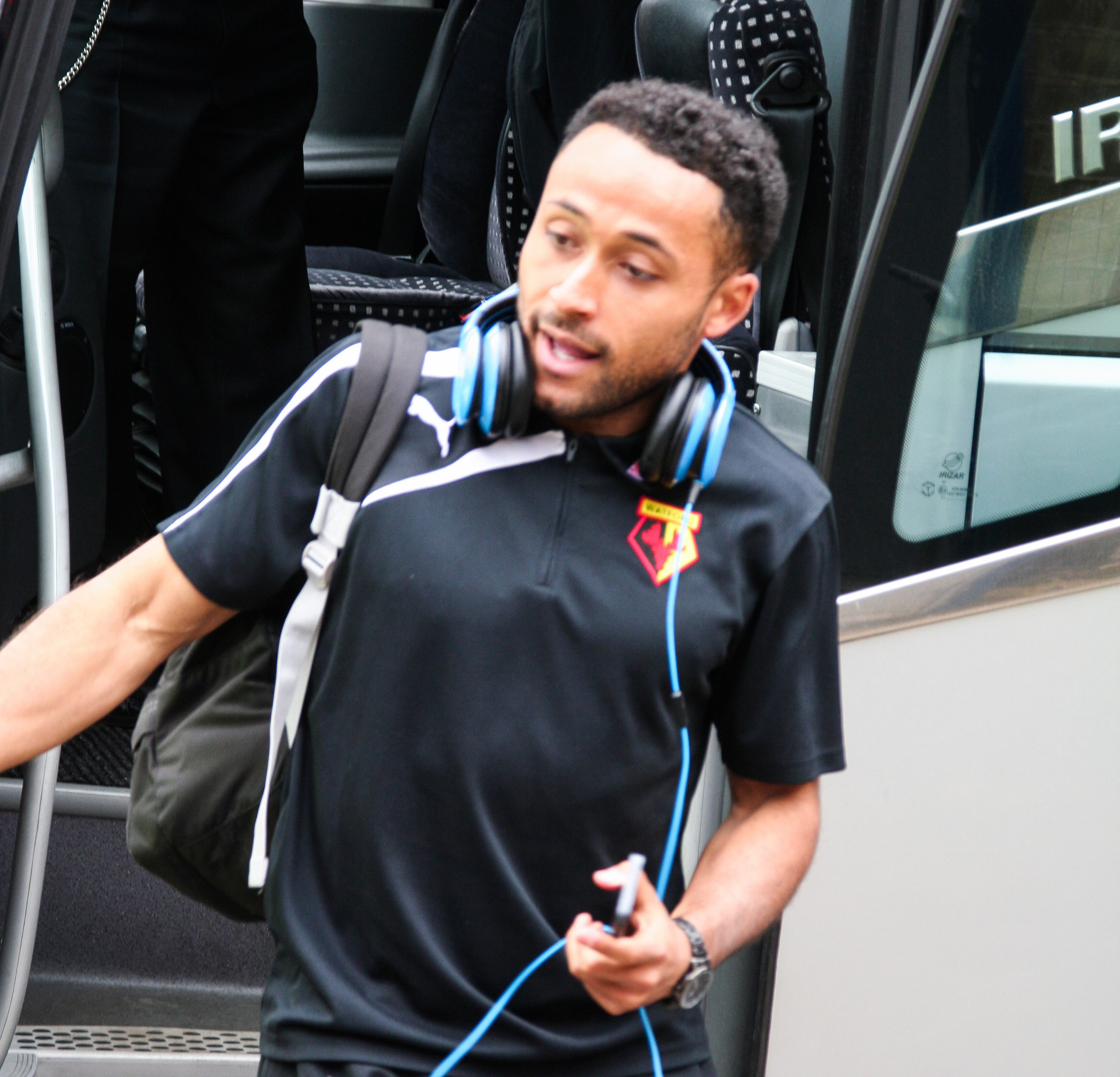 Ikechi Anya